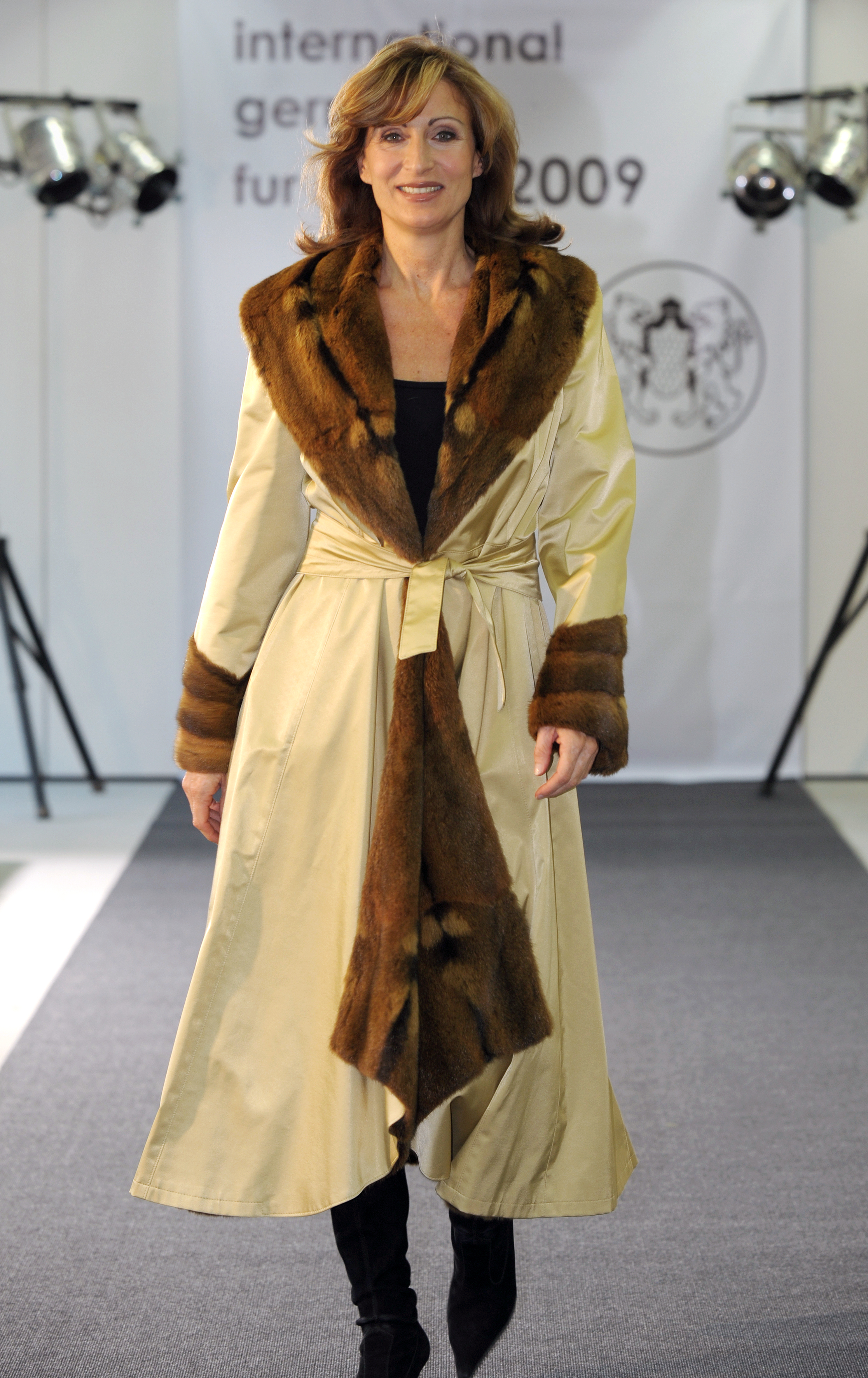 International German Fur Award 2009 des Kürschnerhandwerks.